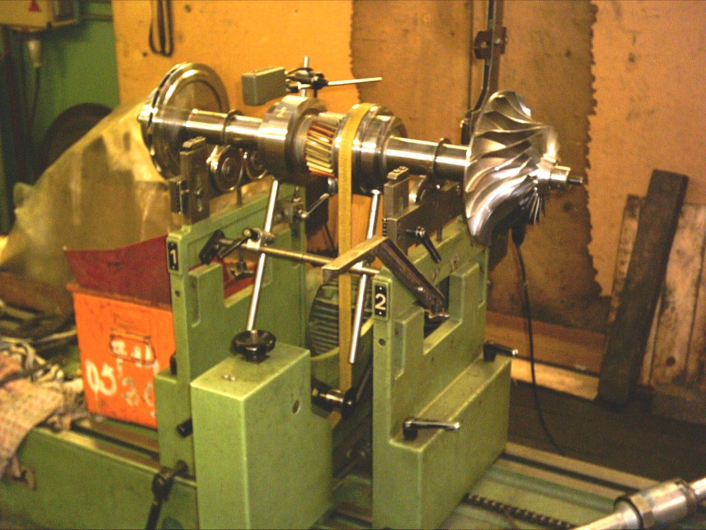 Vyvažovací stroj s pevným uložením.